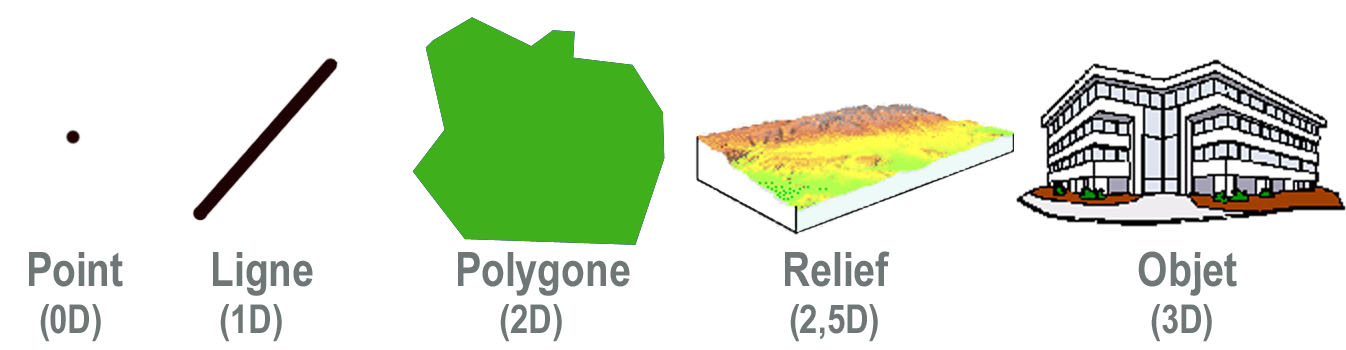 taille/représentation des données dans un sig